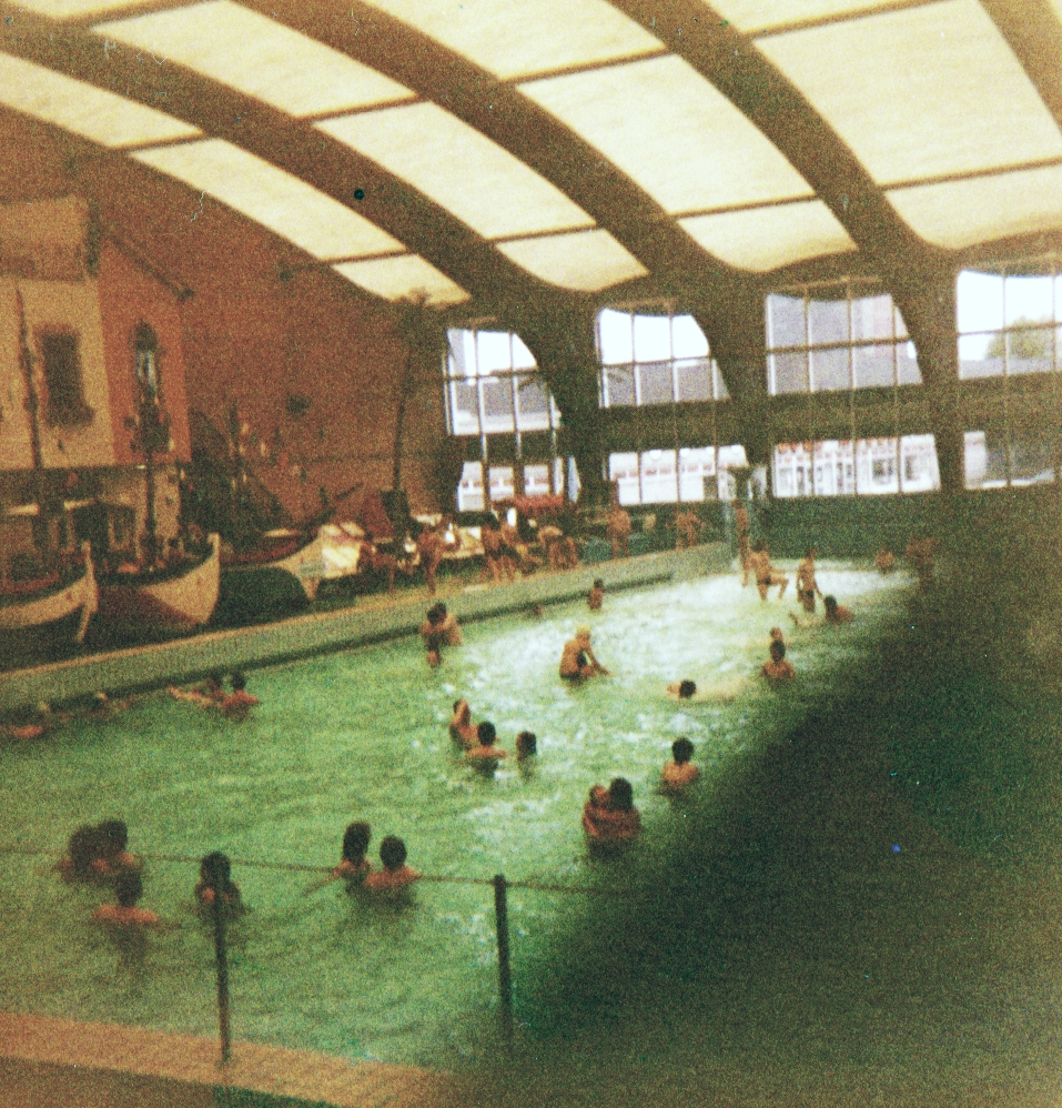 ehemaliges Spaßbad Tropa Mare in Dortmund Bornstr WEZ. (1973-1984 (?,siehe CommonsDisk)), geschlossen nach Chlorfreisetzung mit Verletzten, zu sehen Hälfte des Wellenbades mit Palmen, Strandkörben. Nicht zu sehen Ägypt. Sprudelbad in 8-Form u.a.